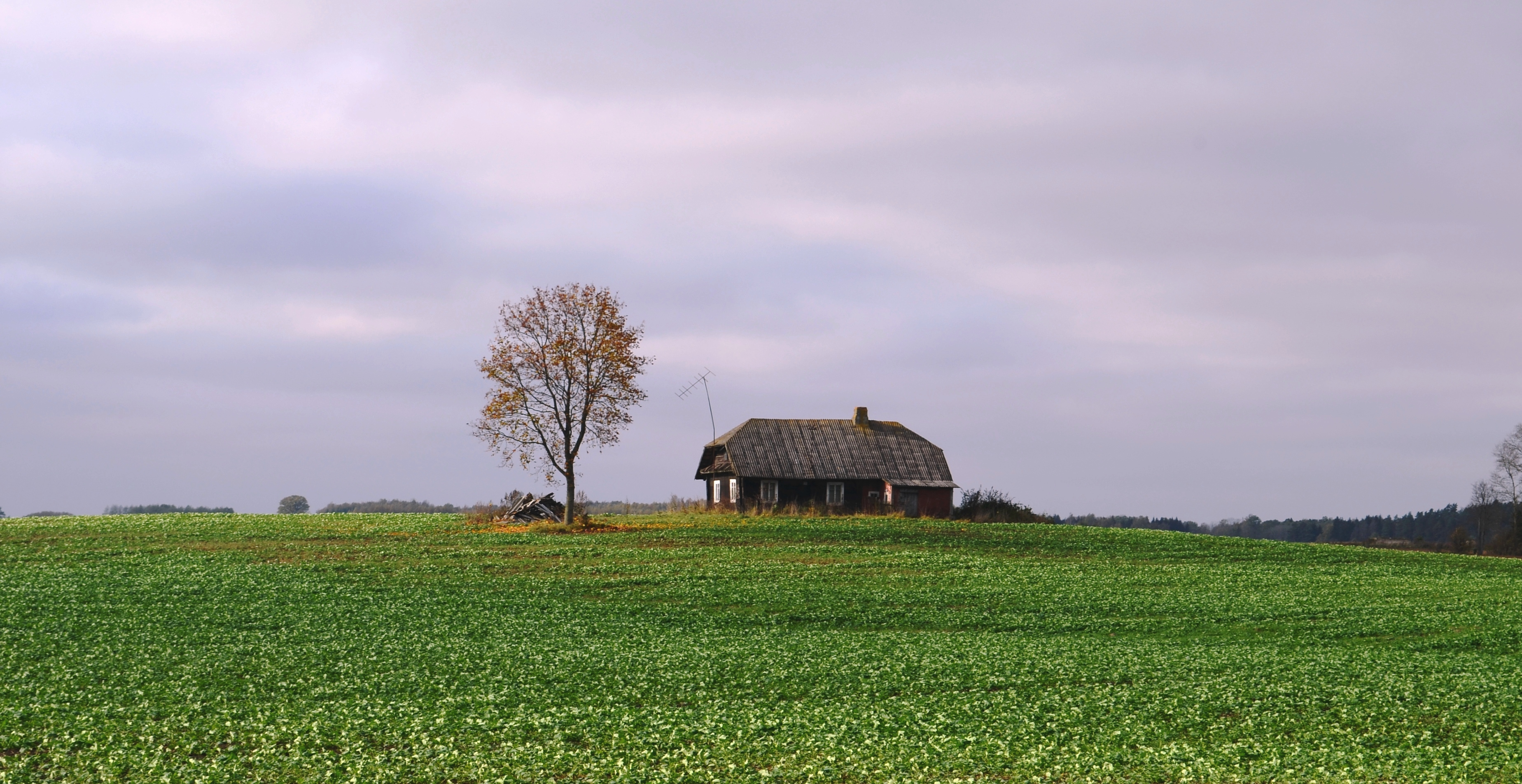 Sena sodyba, Jokūbaičiai, Kėdainių raj.